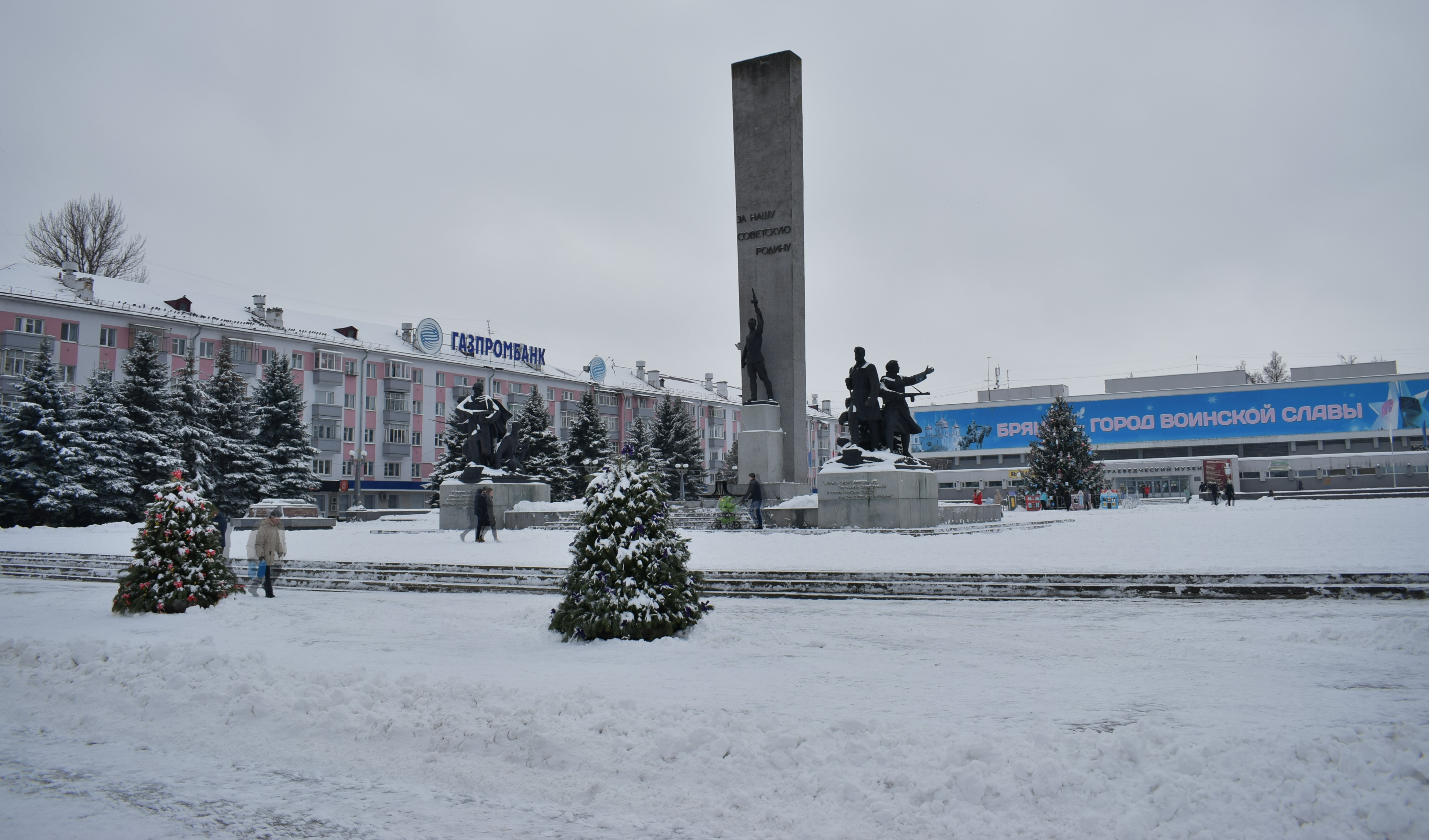 Памятник освободителям Брянска на переднем плане, Краеведческий музей - на заднем.